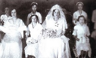 صورة نادرة في يوم زواج الملكه عاليه الى الملك غازي رحمهم الله